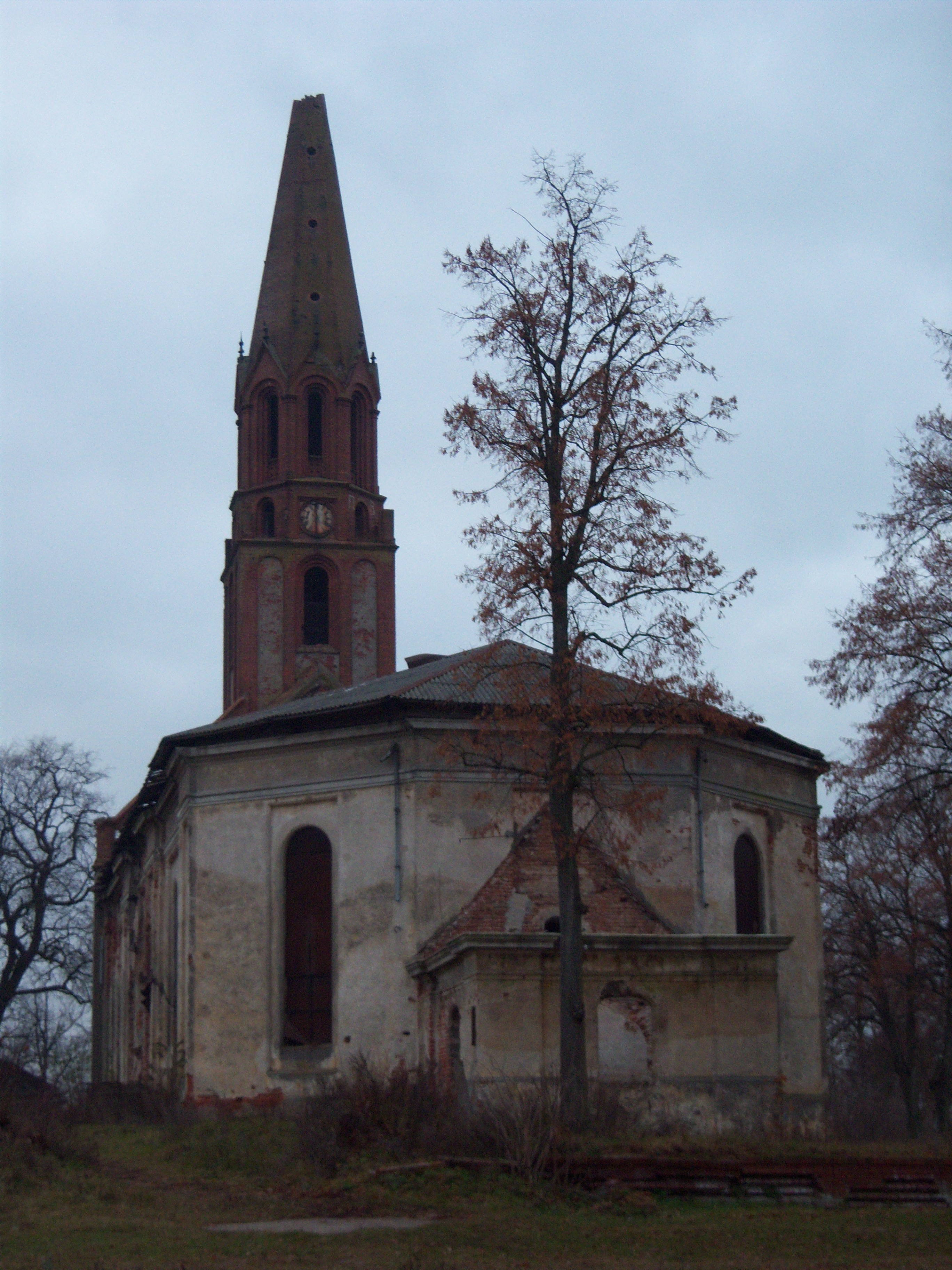 На фото-пос. Ясное, кирха, которая относительно неплохо сохранилась